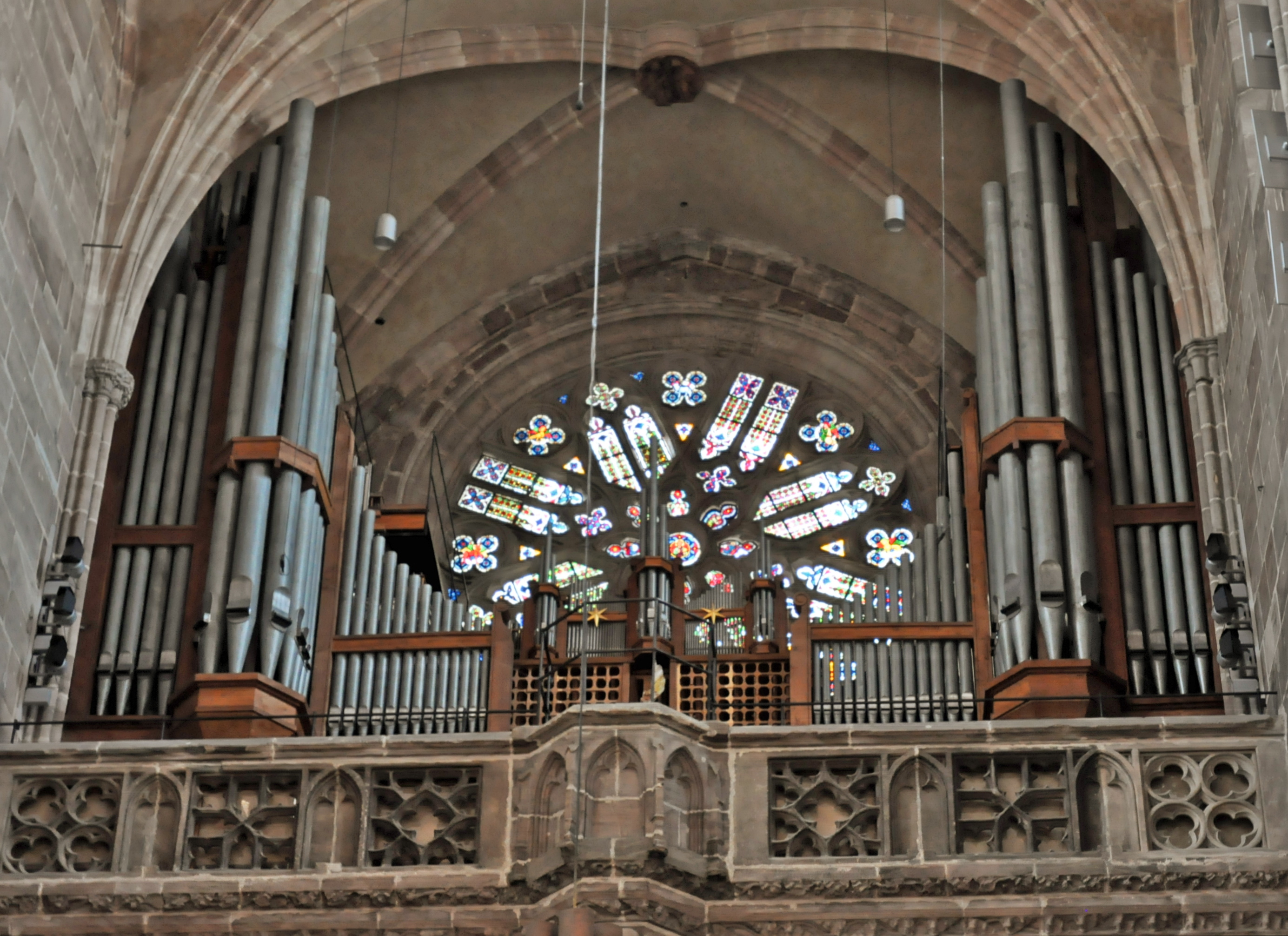 Hauptorgel in der Lorenzkirche Nürnberg